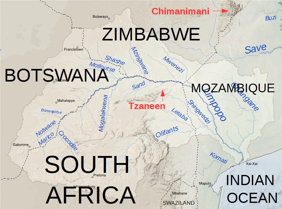 Representació del relleu general i dels punts on comença i acaba la discontinuïtat de l'escarpament geològic sud-africà